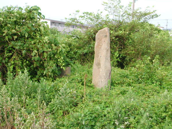 JR黒井駅、頚城鉄道碑